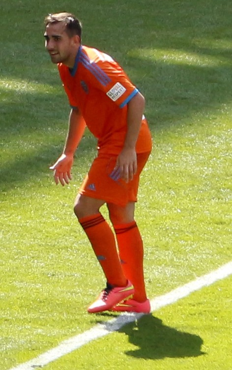 Emirates Cup, 3 d'agost de 2014.